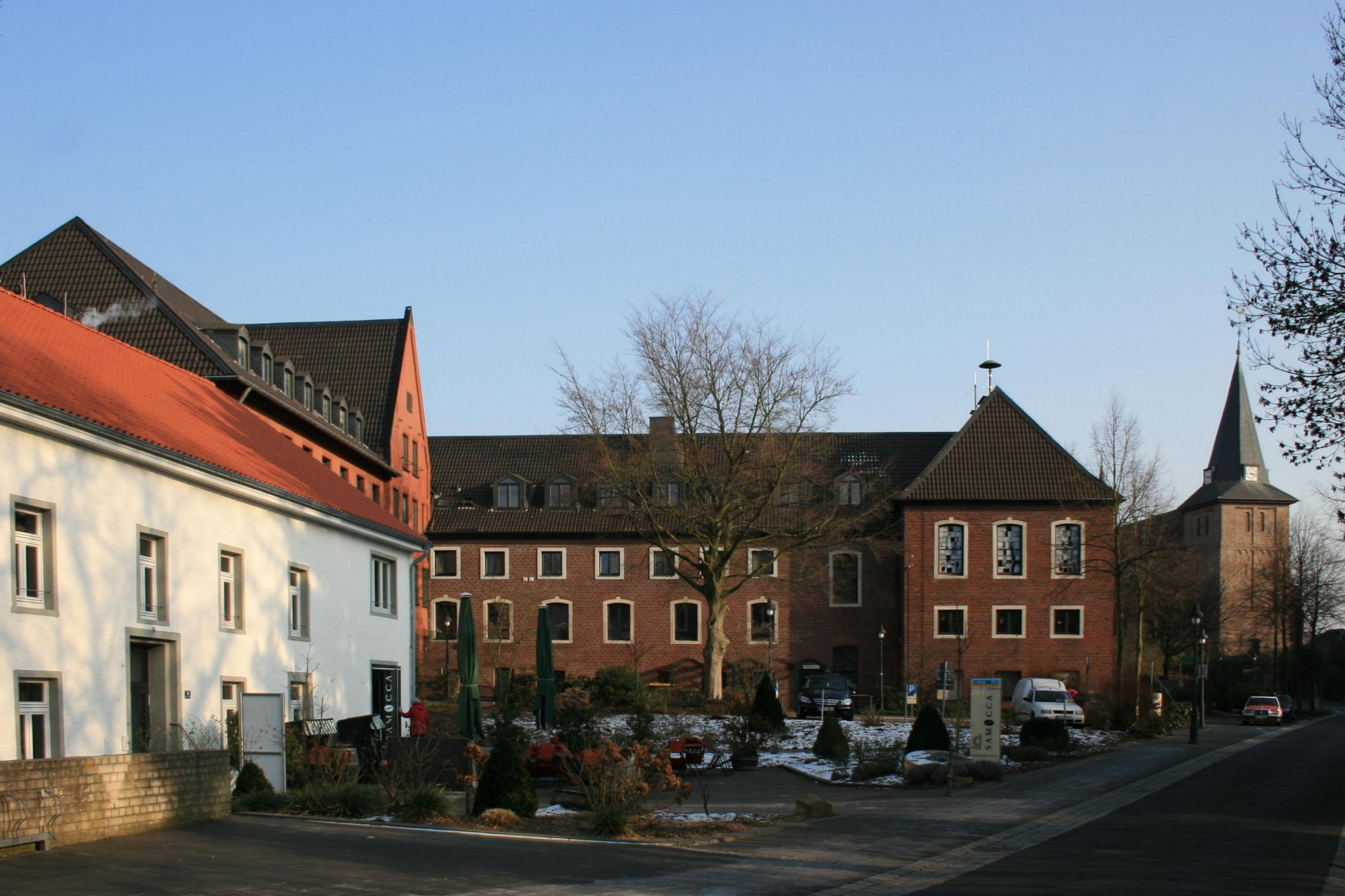 Die Wegberger Mühle mit Blick auf Kirche und Stadtverwaltung